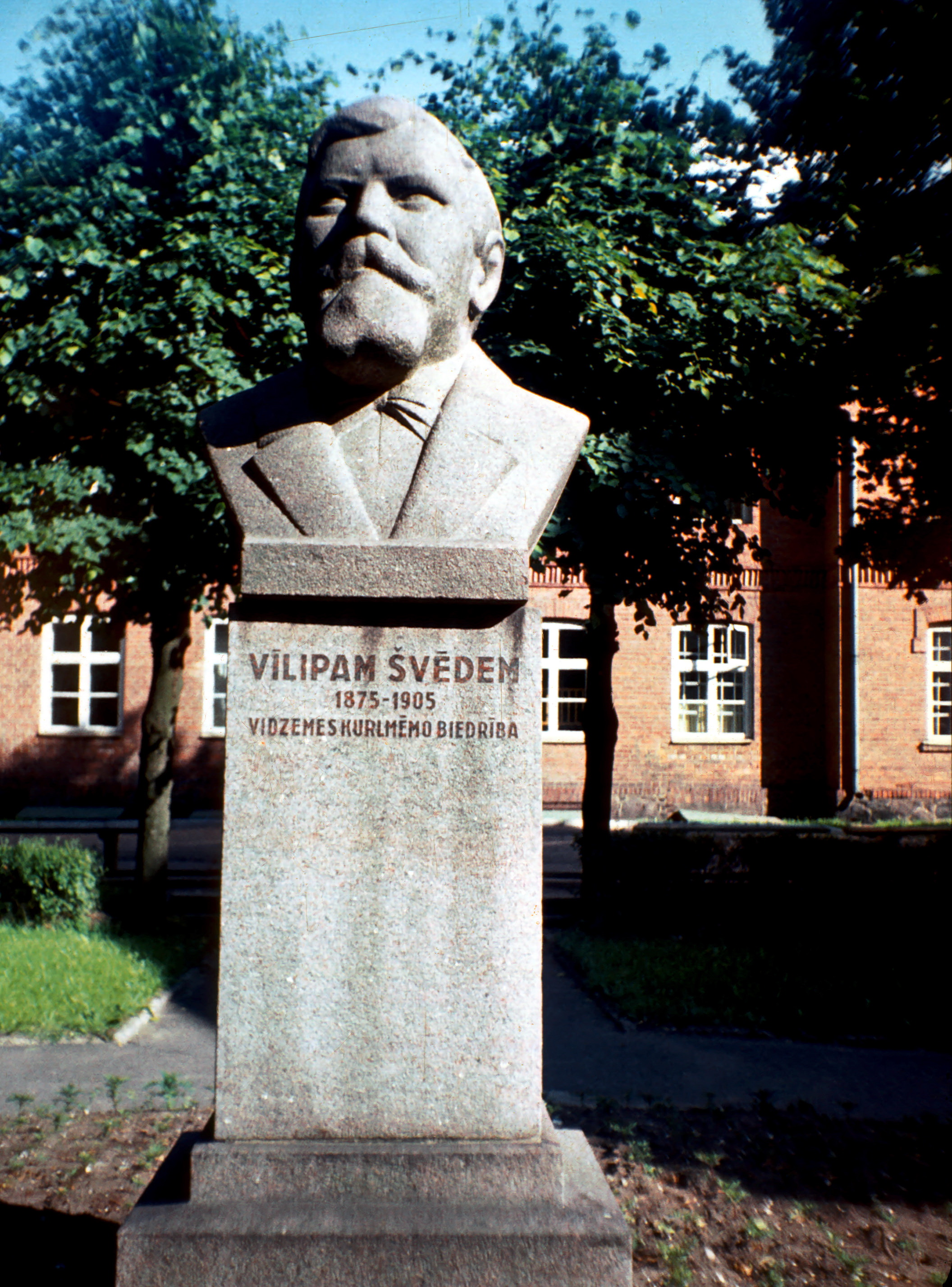 Vilipa Švēdes piemineklis Valmierā